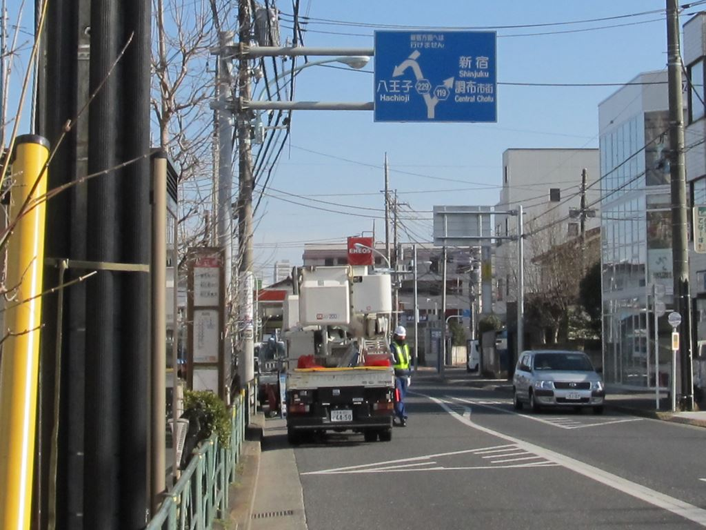 西調布駅入口バス停。東京都道229号府中調布線、上石原。